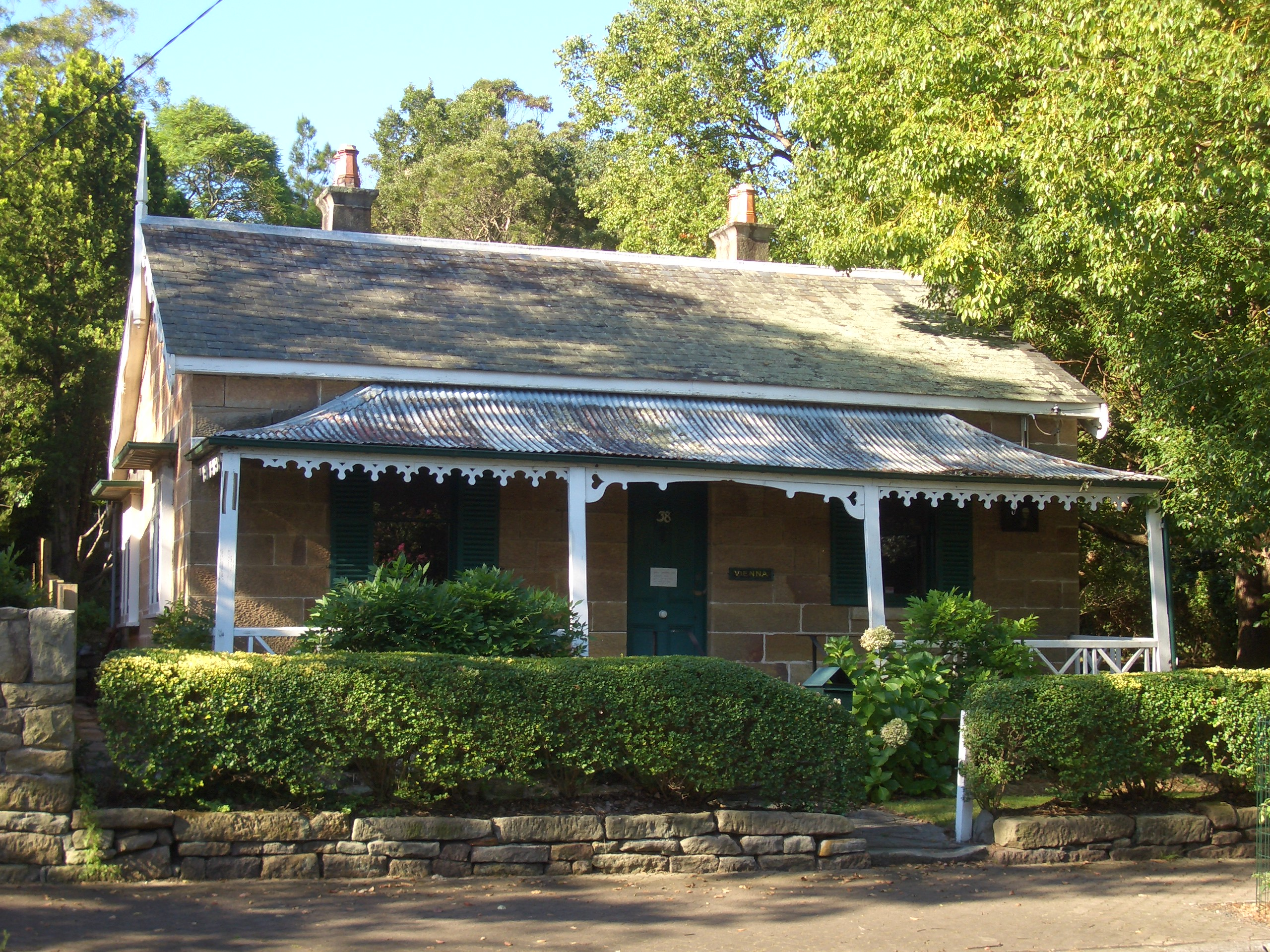 Hunters Hill, Vienna